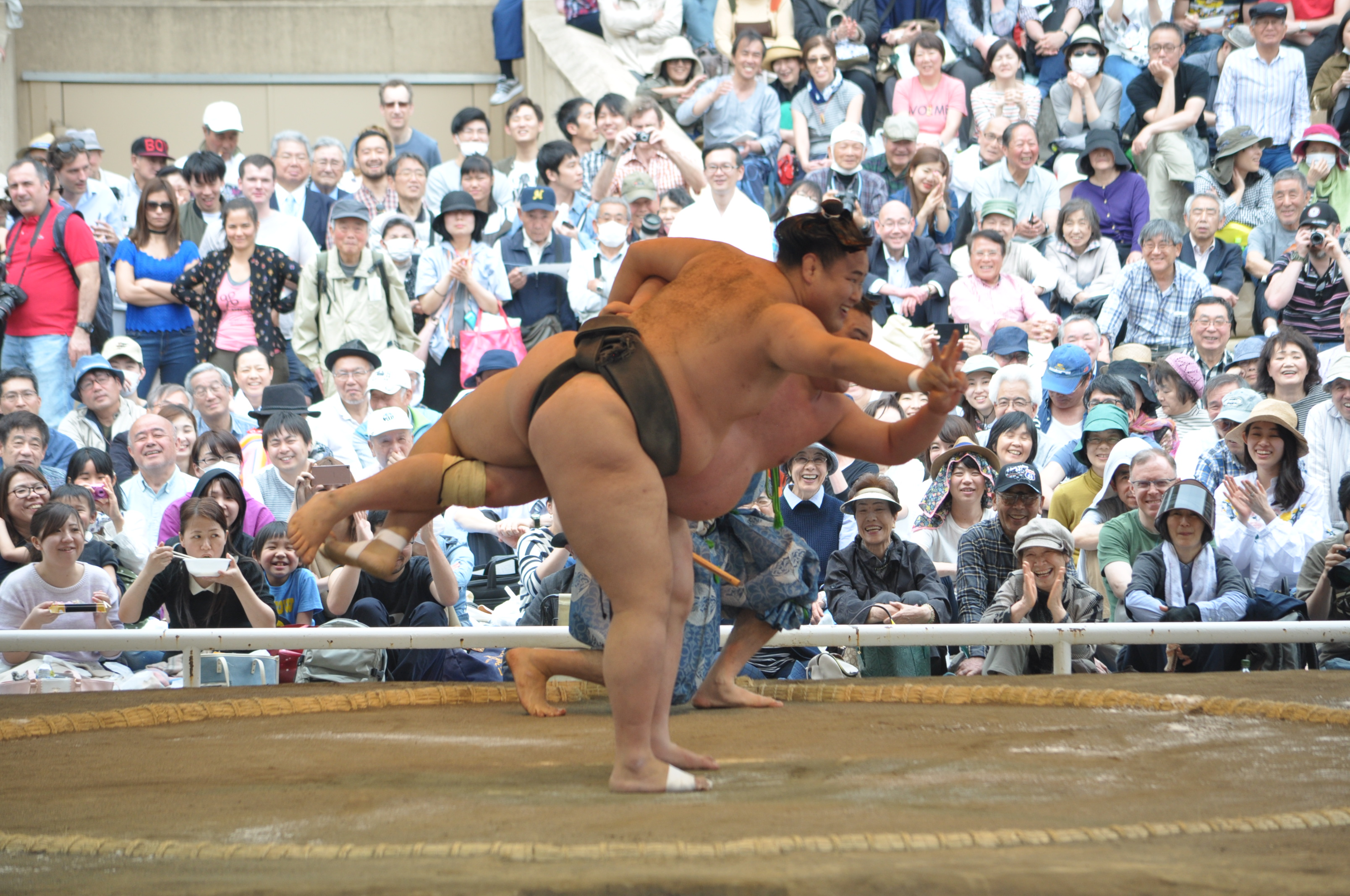 大相撲 初切